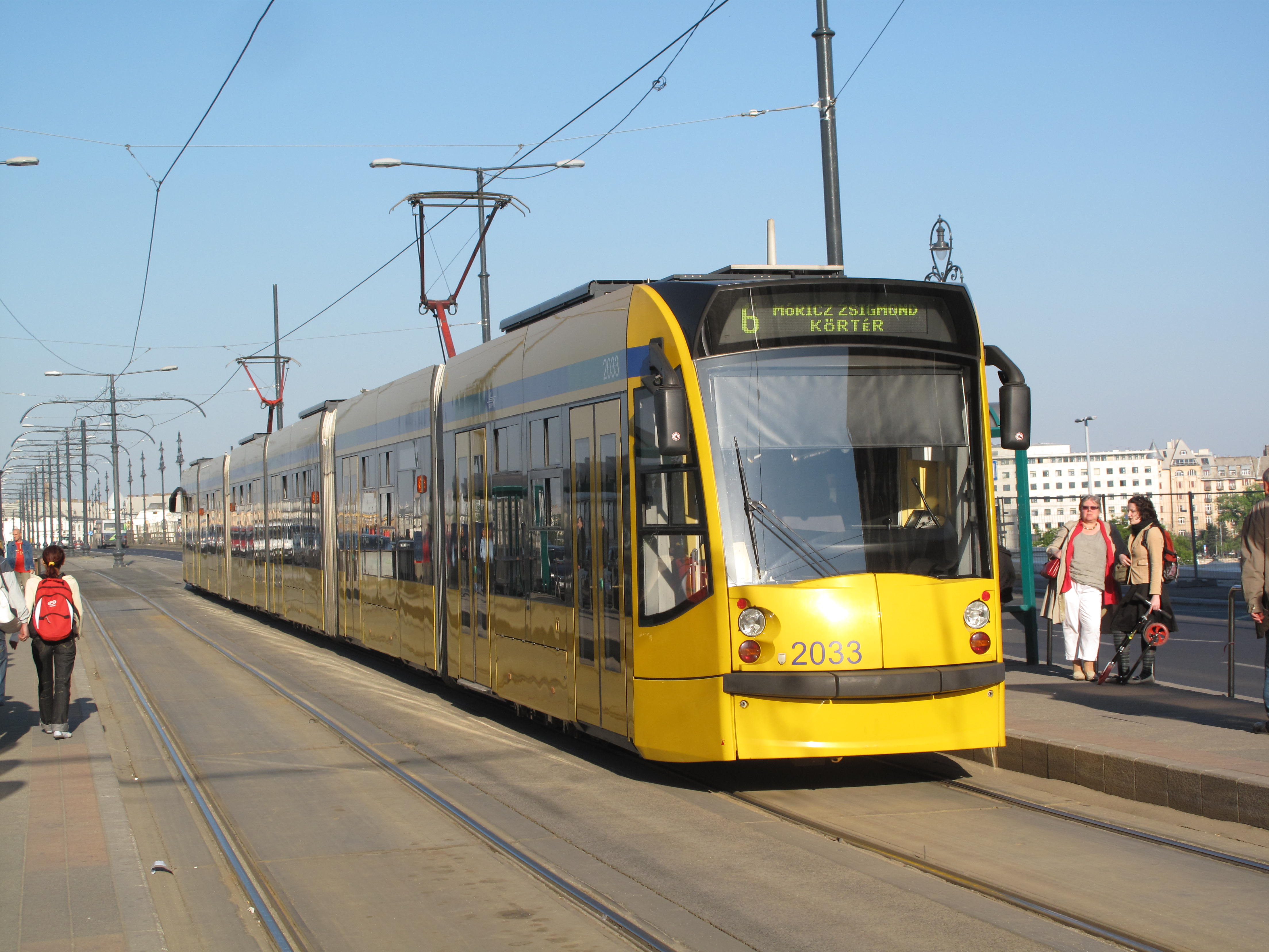 Budapešť